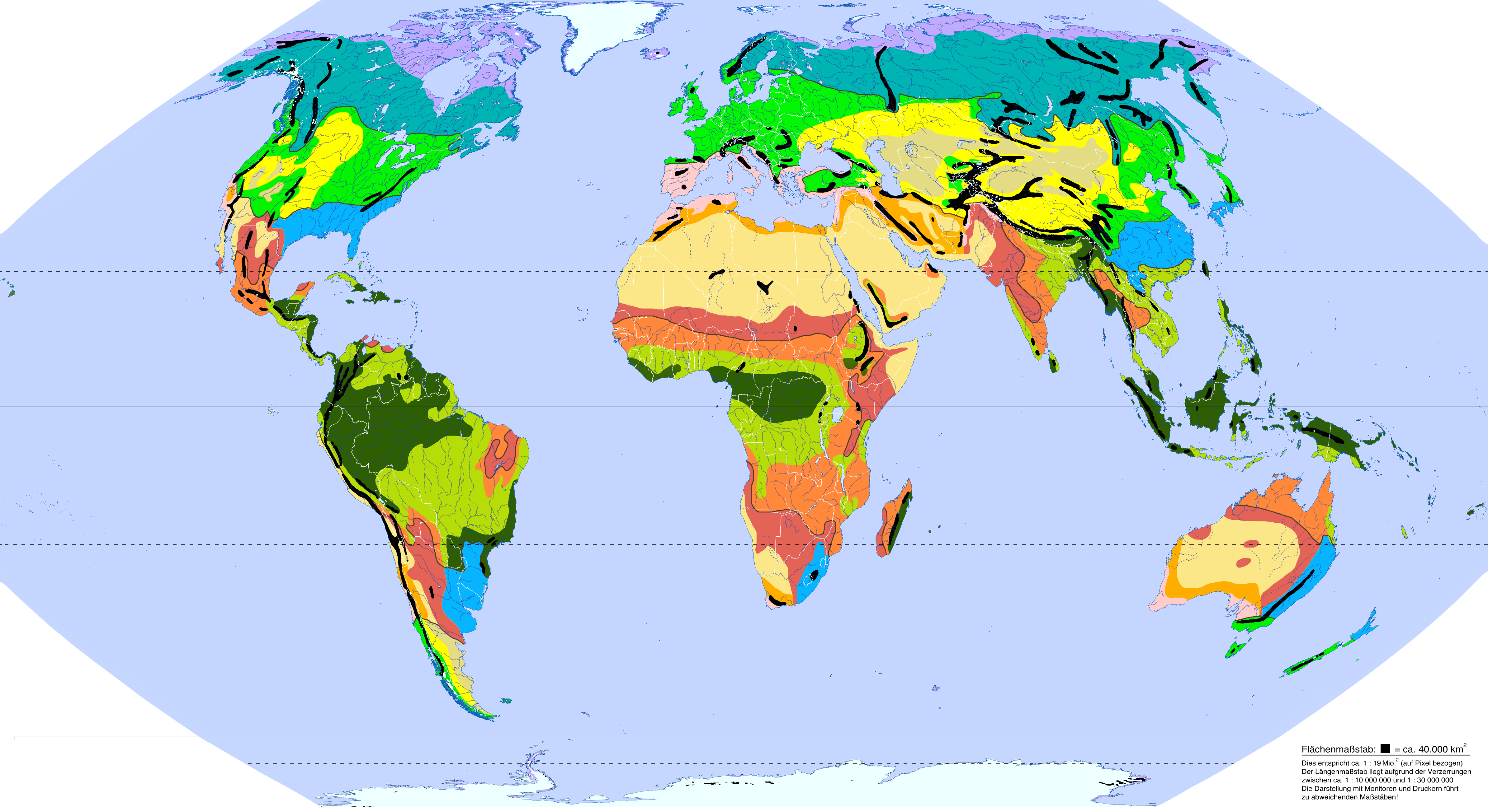 Ökozonen nach Jürgen Schultz